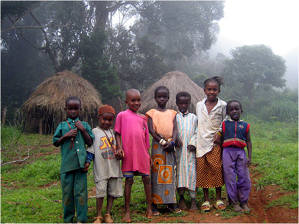 Enfants peuls de Doucky. Photo prise à Fouta-Djalon.